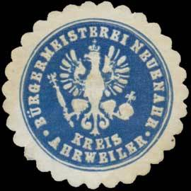 Sealing stamp Title: Bürgermeisterei Neuenahr Kreis Ahrweiler Description: blau, weiß, geprägt Place: Neuenahr size: 4 cm